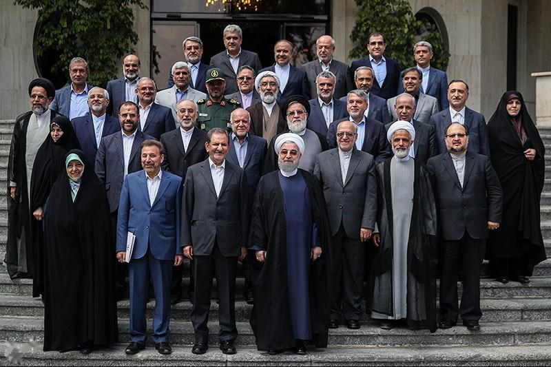 پایان کار کابینه دولت یازدهم - جلسه هیئت دولت صبح امروز یکشنبه ۲۲ مرداد برگزار شد و کابینه دولت یازدهم به کار خود پایان داد. حجت‌الاسلام حسن روحانی رئیس جمهور و اعضای دولت یازدهم در پایان این جلسه عکس یادگاری گرفتند.